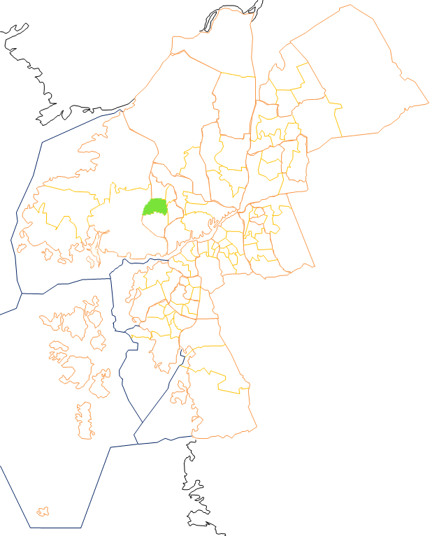 Karta som visar primärområdes belägenhet i Göteborg